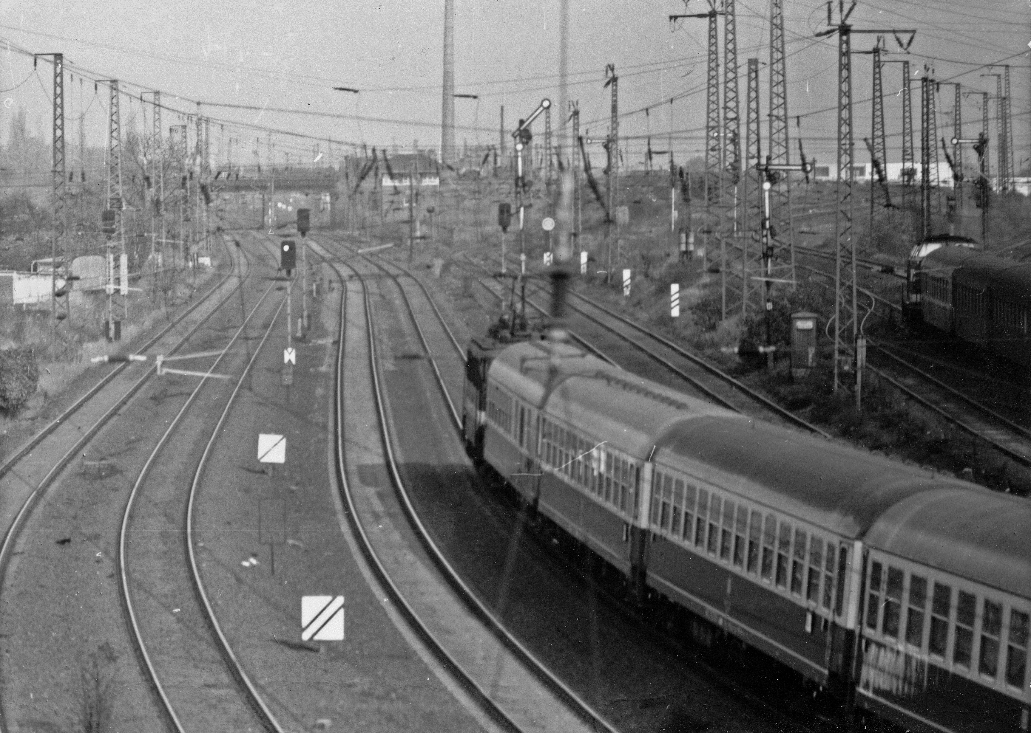 nördlicher Blick von Berliner Brücke auf den Ost-West-Express nach Berlin-Wannsee, Interzonenzug, fotoscan, Halle Saale 12-1984